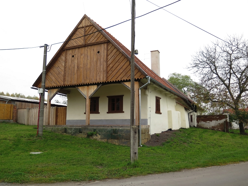 Usedlost čp. 24, Žitovlice 24, Žitovlice.